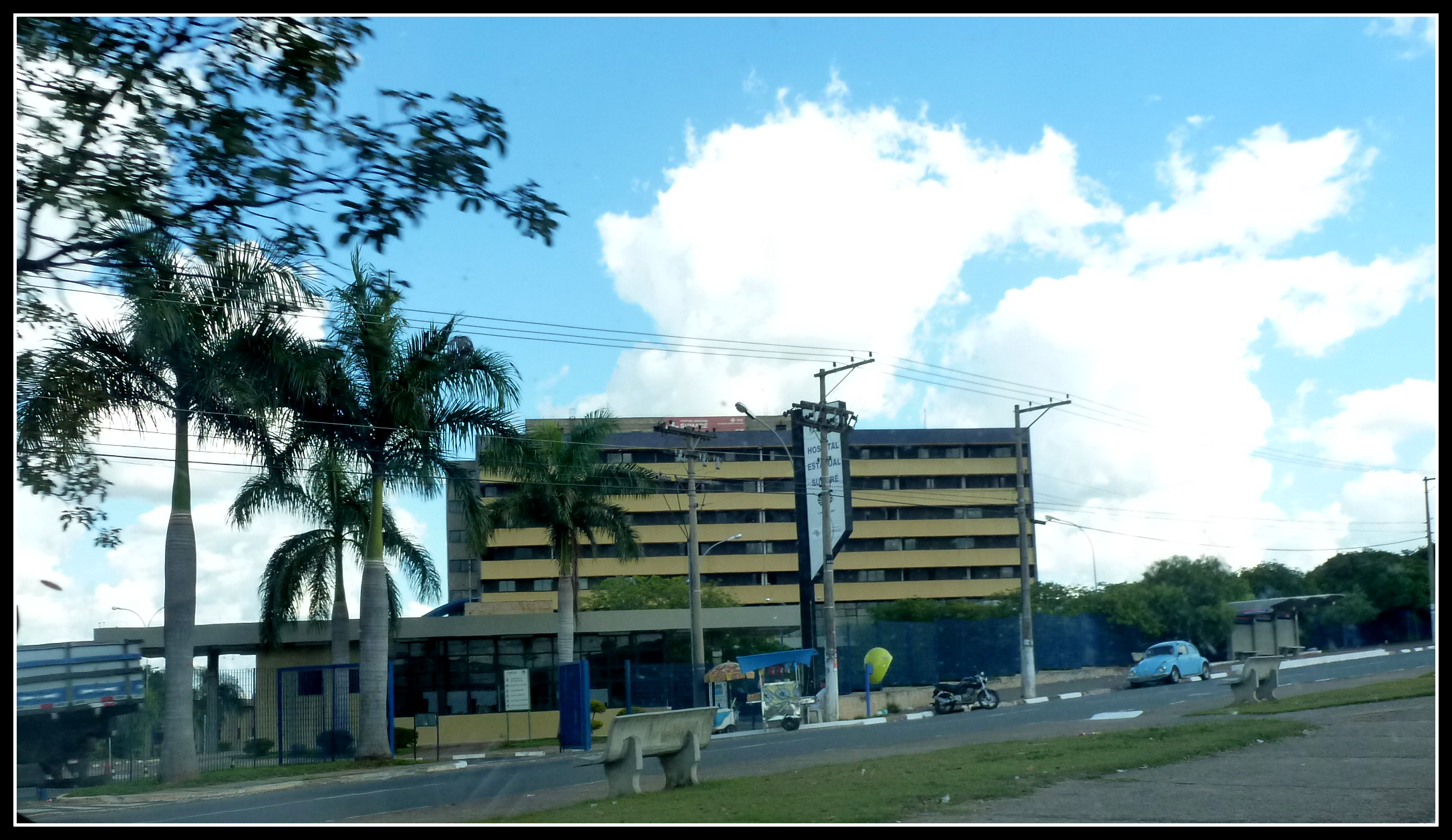 Hospital municipal de Sumaré